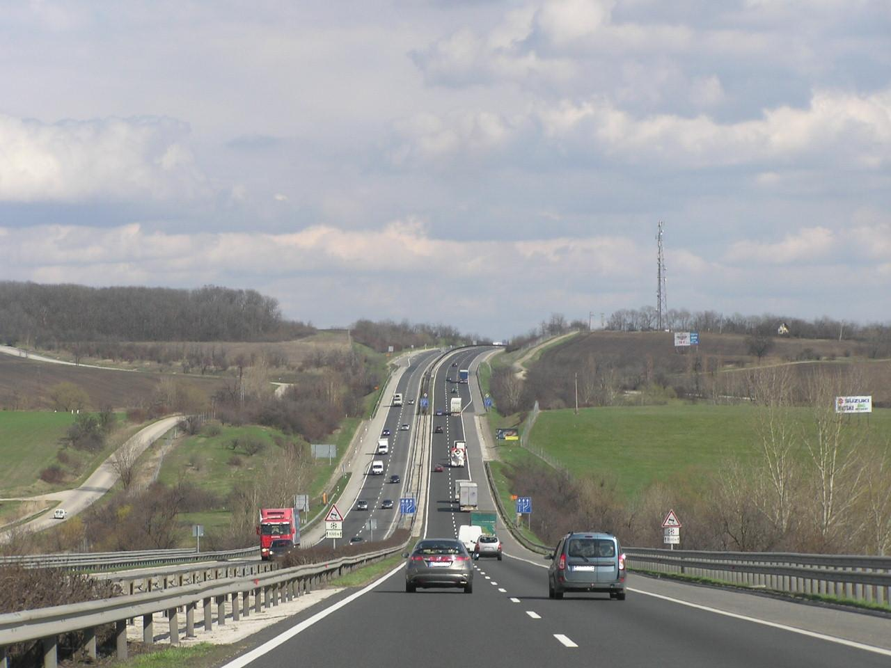 Autobahn M1 in Richtung Budapest aus Wien kommend.